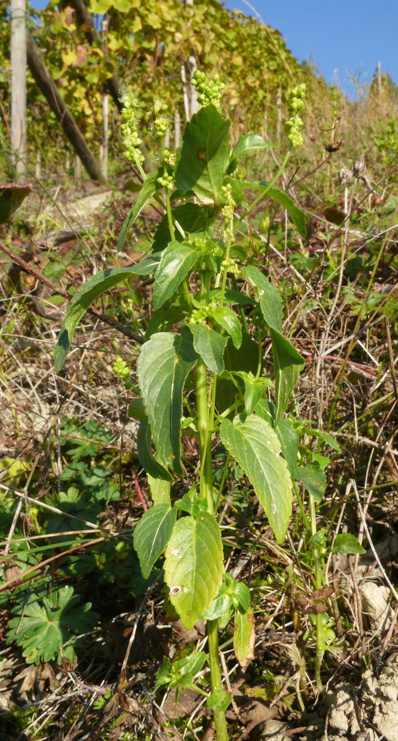 Mercurialis annua, Tauberland, Germany